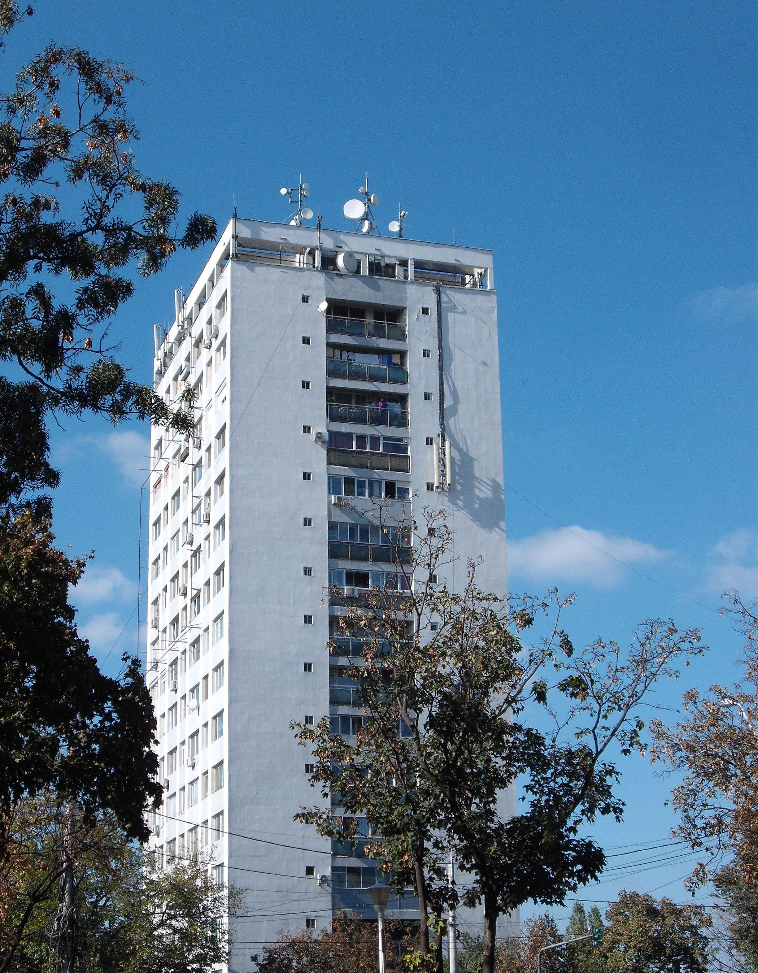 Bloc turn intersectie Toporasi